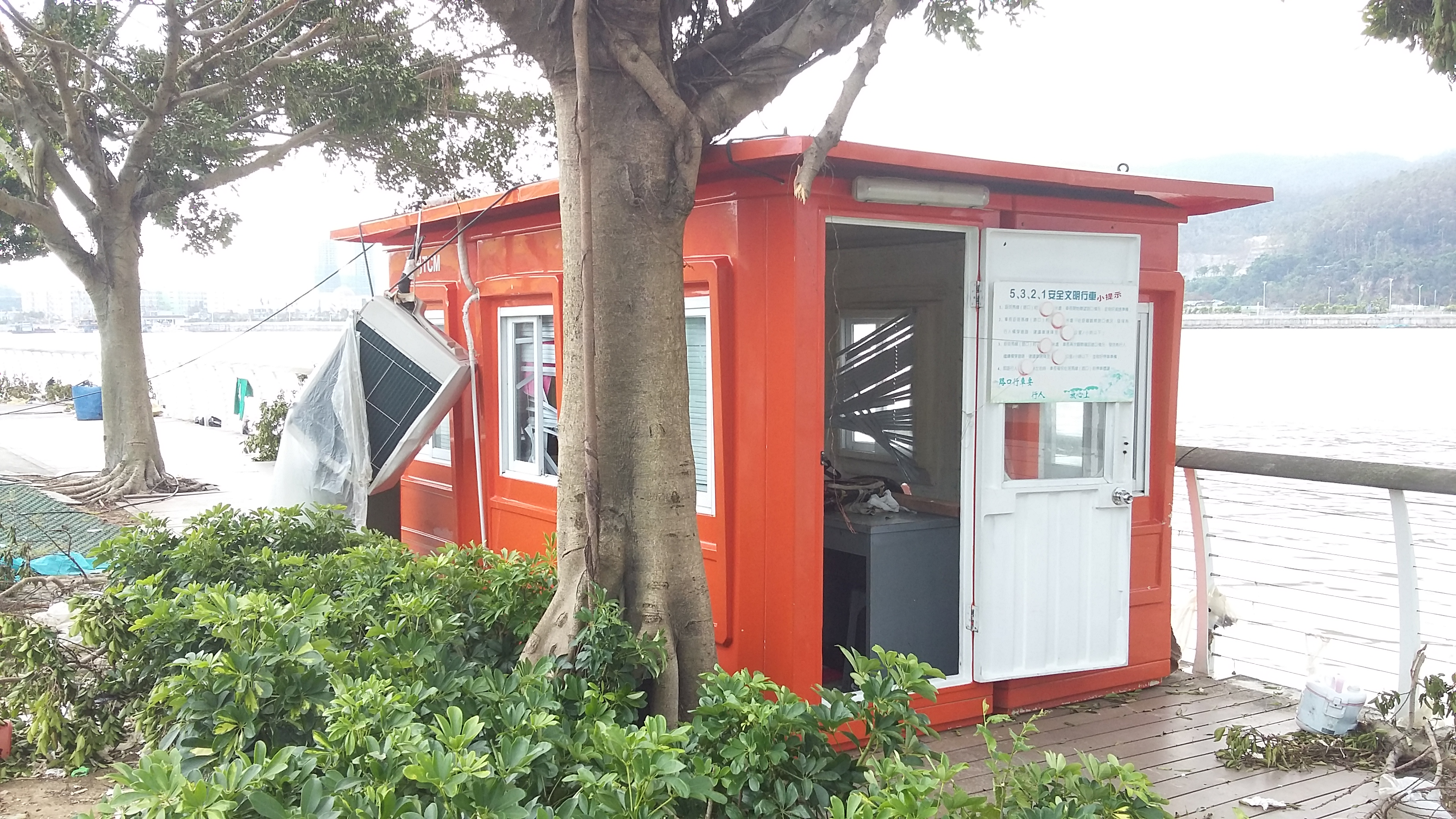 風暴過後第二日，風順堂區情況。